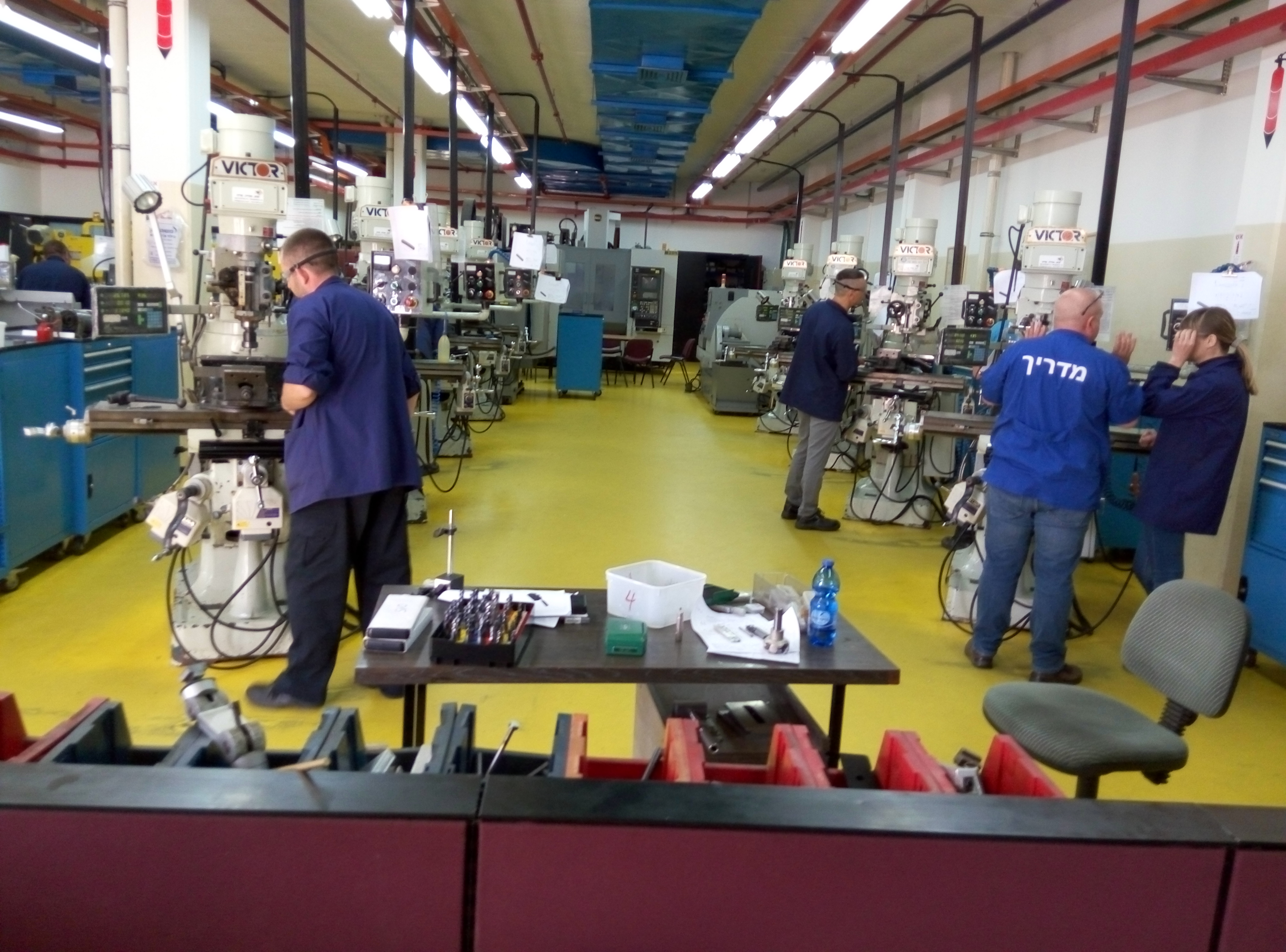 תלמידים במרכז הכשרה מקצועי